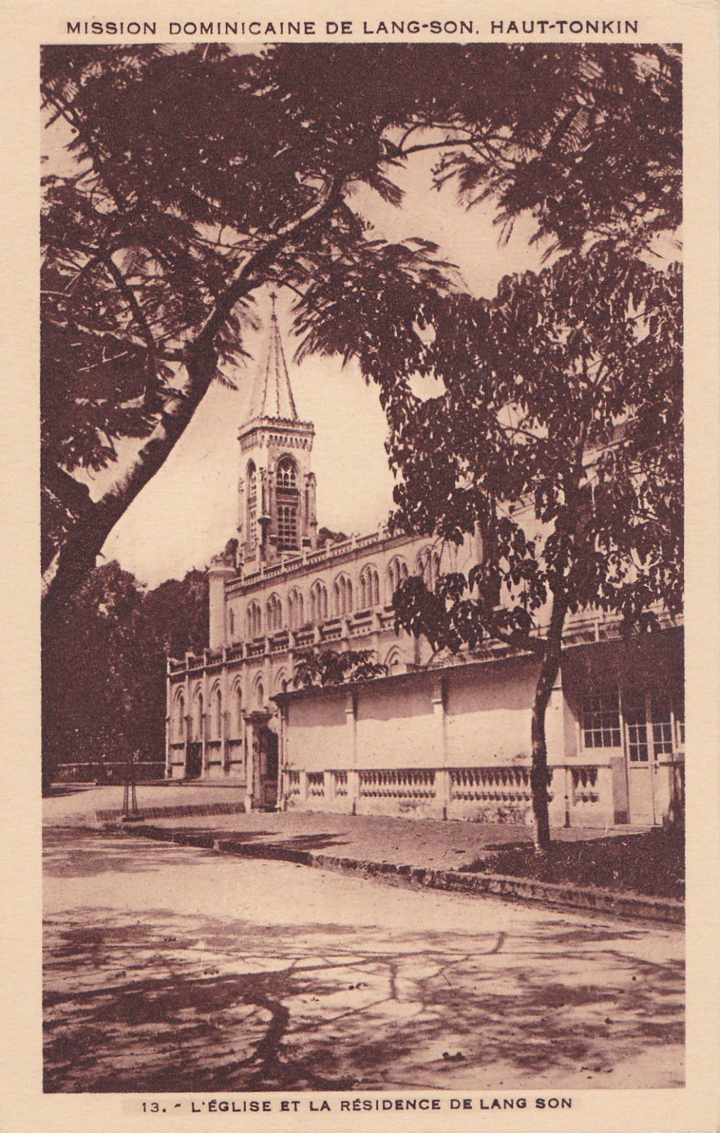 Mission dominicaine de Lang Son (Haut-Tonkin) en 1925.